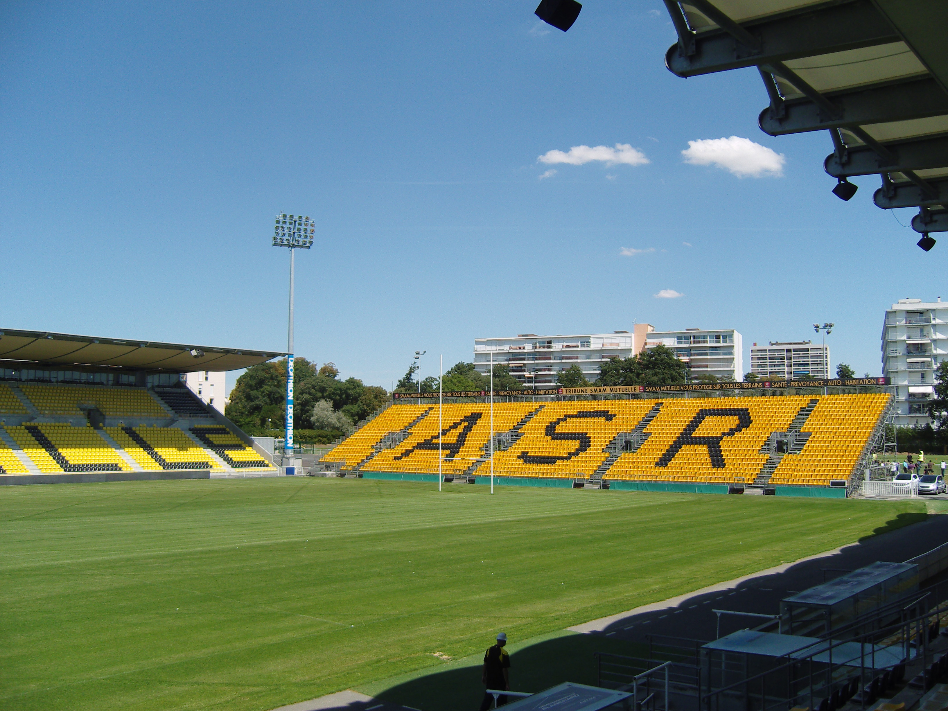 Stade Marcel Deflandre (tribune d'en but)